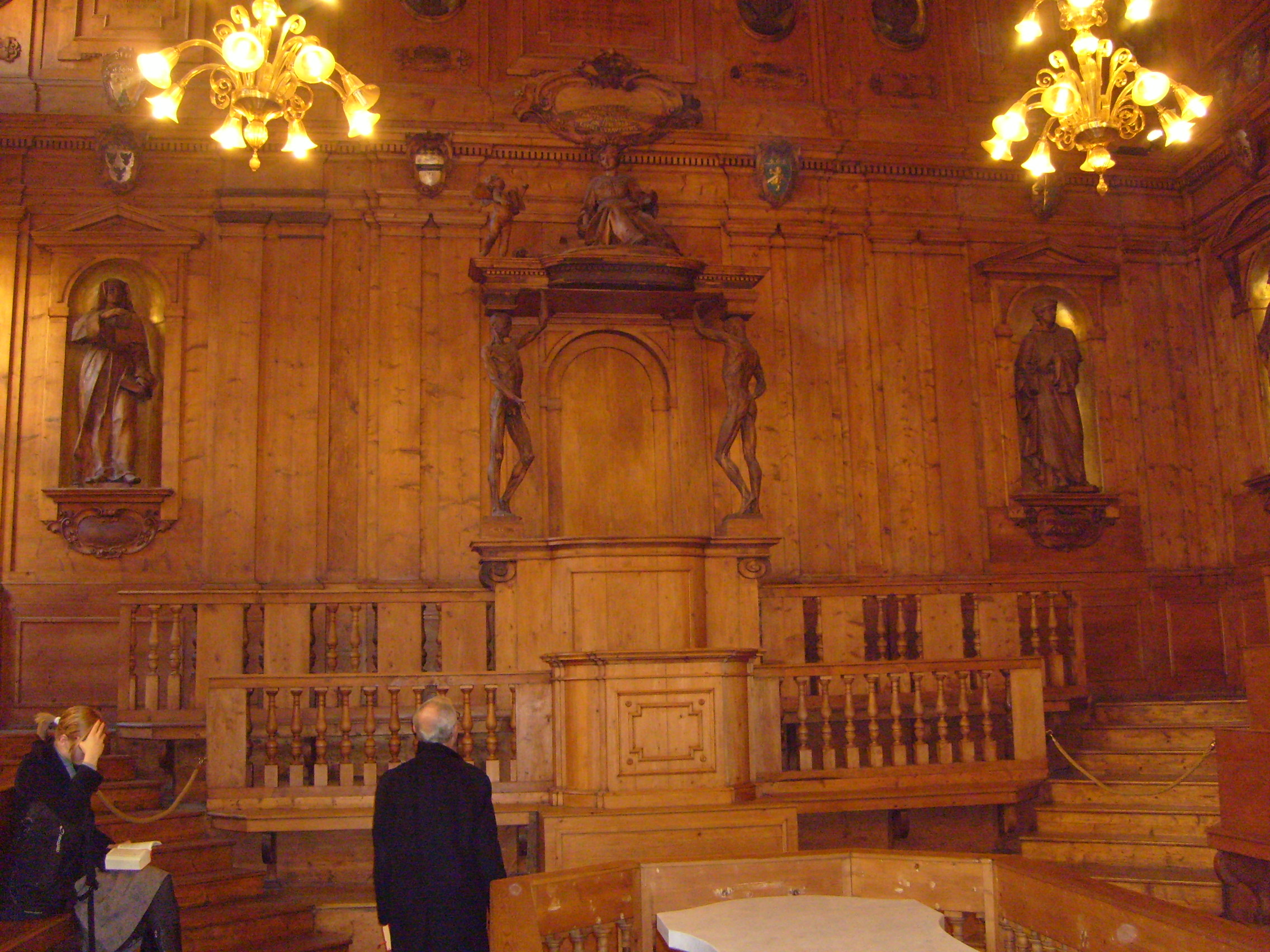 Anatomical theatre (general view), Palazzo dell’Archiginnasio, Bologna, Italy